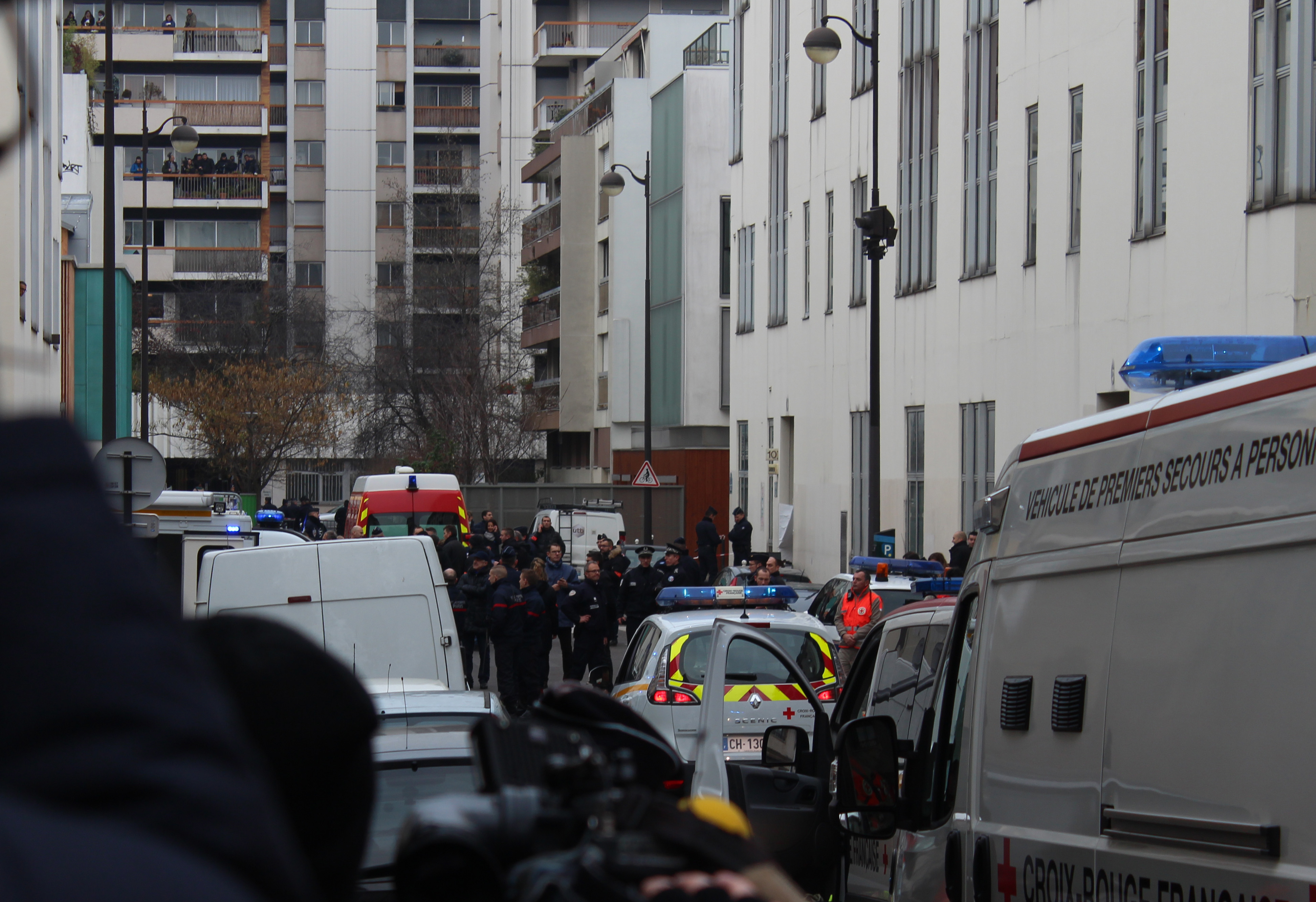 Vue de la zone du 11e arrondissement (rue Nicolas Appert) interdite aux badauds par la police après la fusillade au siège de Charlie Hebdo, prise avec l'aide du journaliste de LCP Jérémie Hartmann.